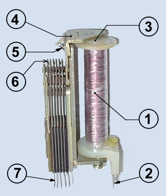 Neŭtrala relajso: 1 bobeno, 2 konduktiloj por nutrado de bobeno, 3 ferkerno, 4 levstango, 5 risorto, 6 kontaktiloj, 7 eksteraj konduktiloj.